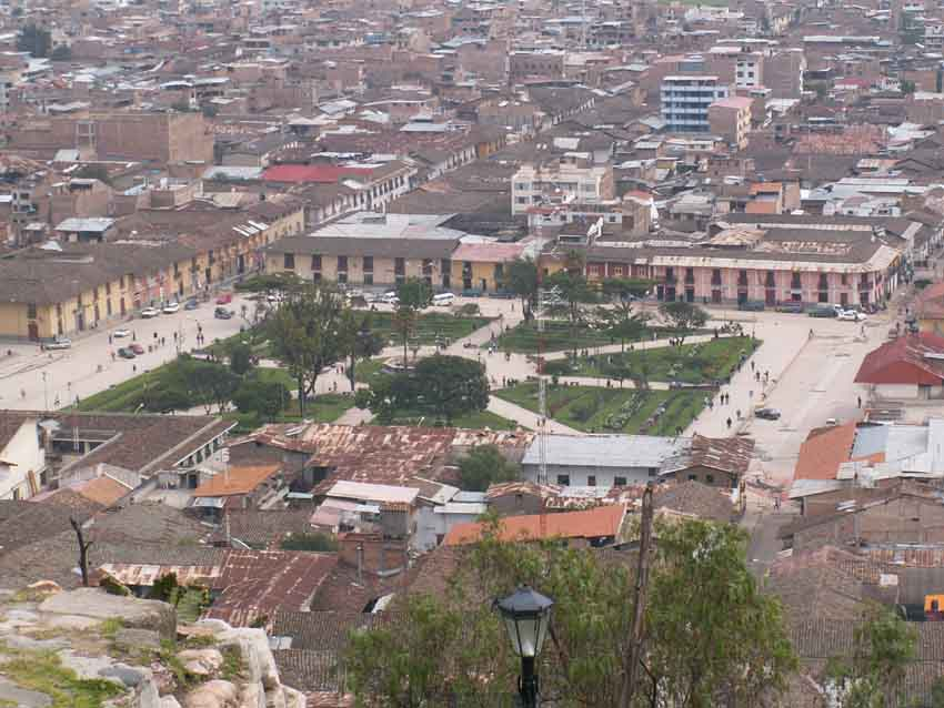 Photo prise par l'auteur Licence libre Vue de la ville depuis Santa Apolonia avec le siège de l'Inca au premier plan